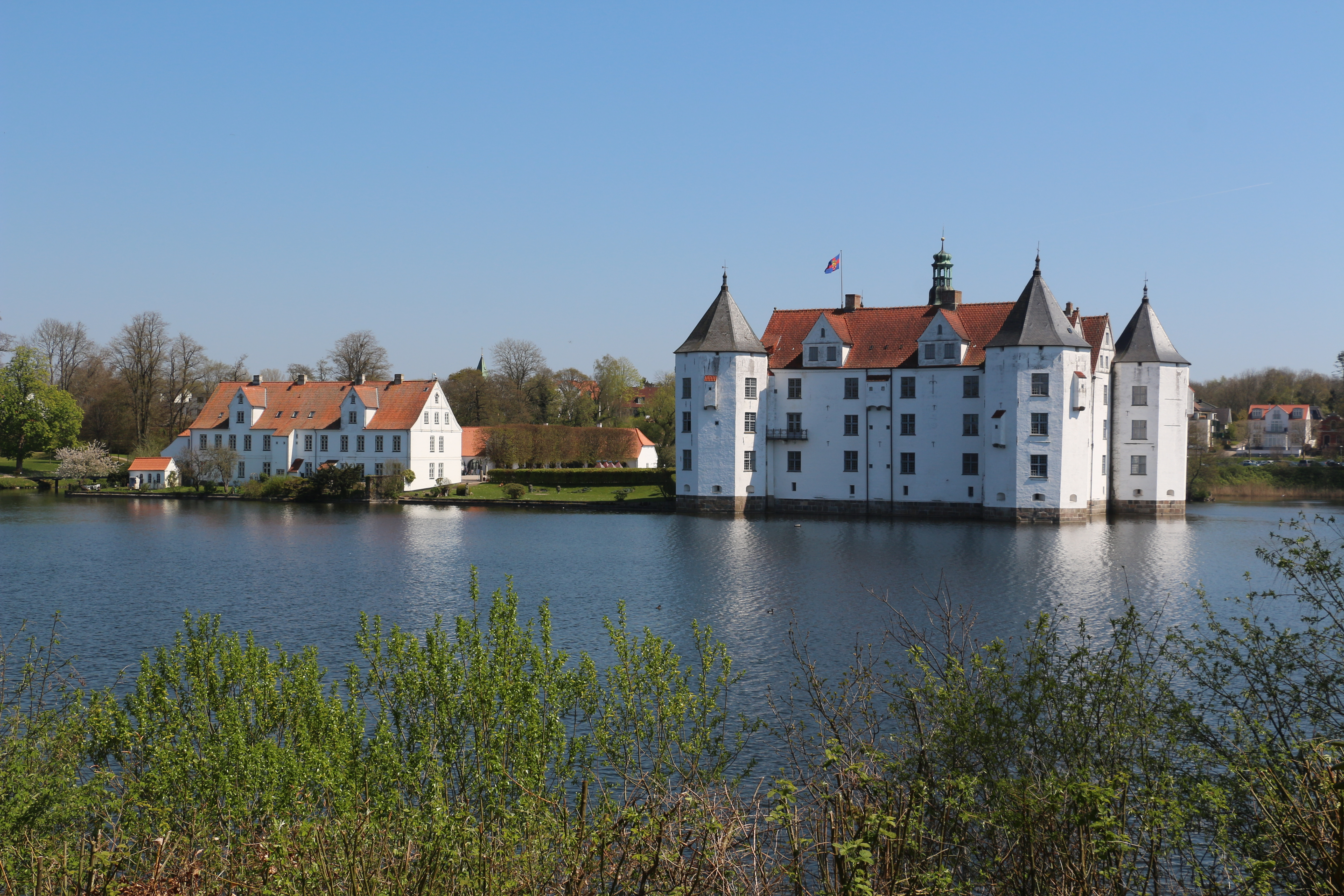 Schloss Glücksburg über den Schlossteich gesehen